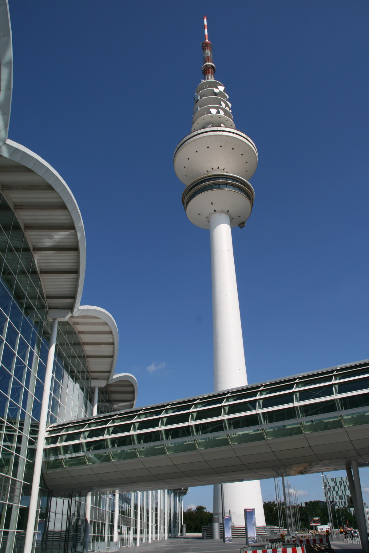 Neue Messe Hamburg mit Fernsehturm